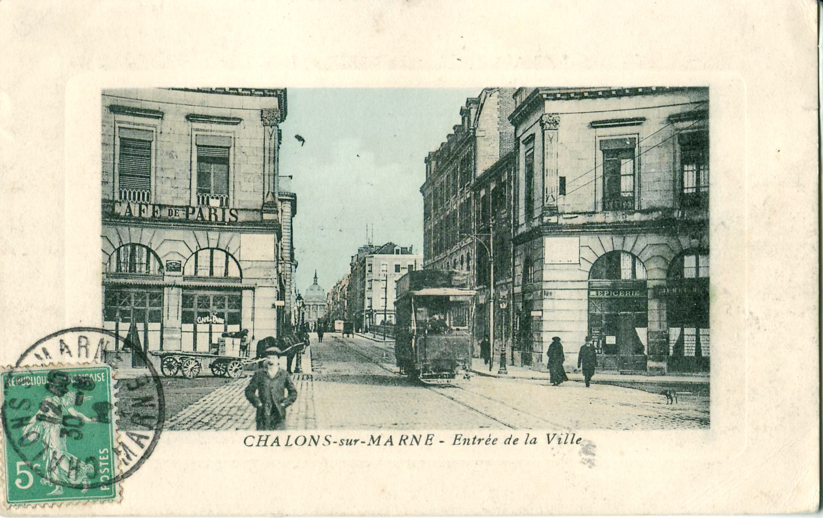 Carte postale sans mention d'éditeur :Châlons-sur-Marne - Entrée de la Ville, place de l'Hémicycle et rue de la Marne vers l'hôtel de ville.